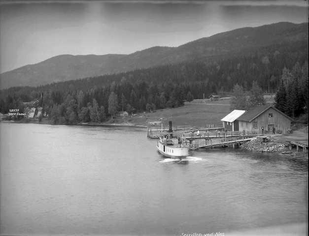 Nes i Ådal, Øvre Ådal, Ringerike